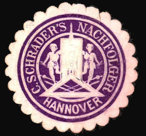 Siegelmarke der Schreibwaren- und Büroartikelanbieters C. Schraders Nachfolger in Hannover, hier mit dem Turm der Marktkirche hinter einem Geodreieck (?) ...